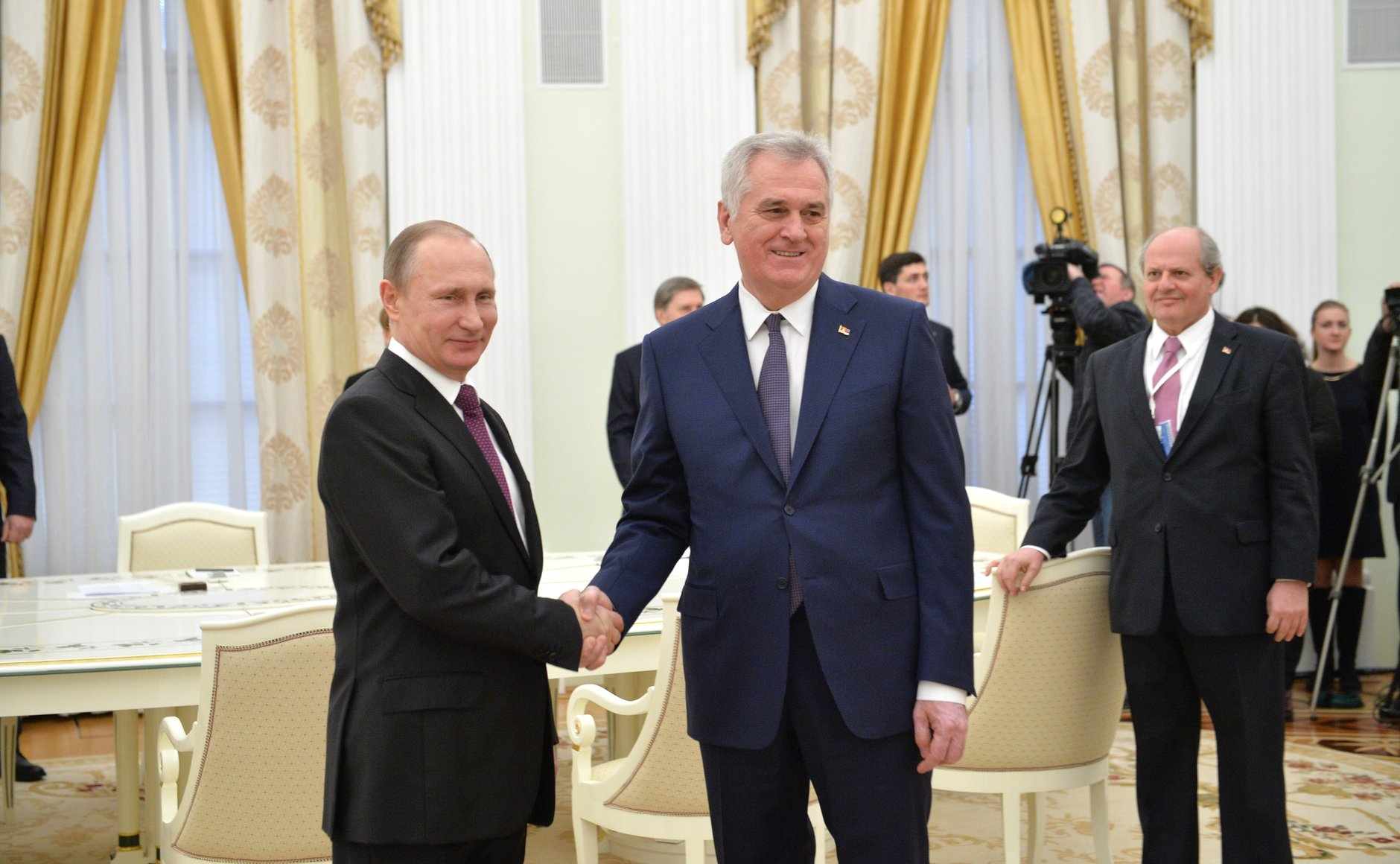 Встреча Президента Российской Федерации Владимира Путина с Президентом Республики Сербия Томиславом Николичем